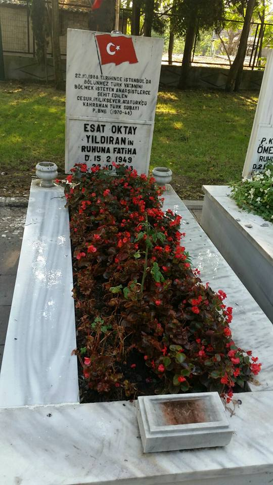 Esat Oktay Yıldıran'ın mezarı